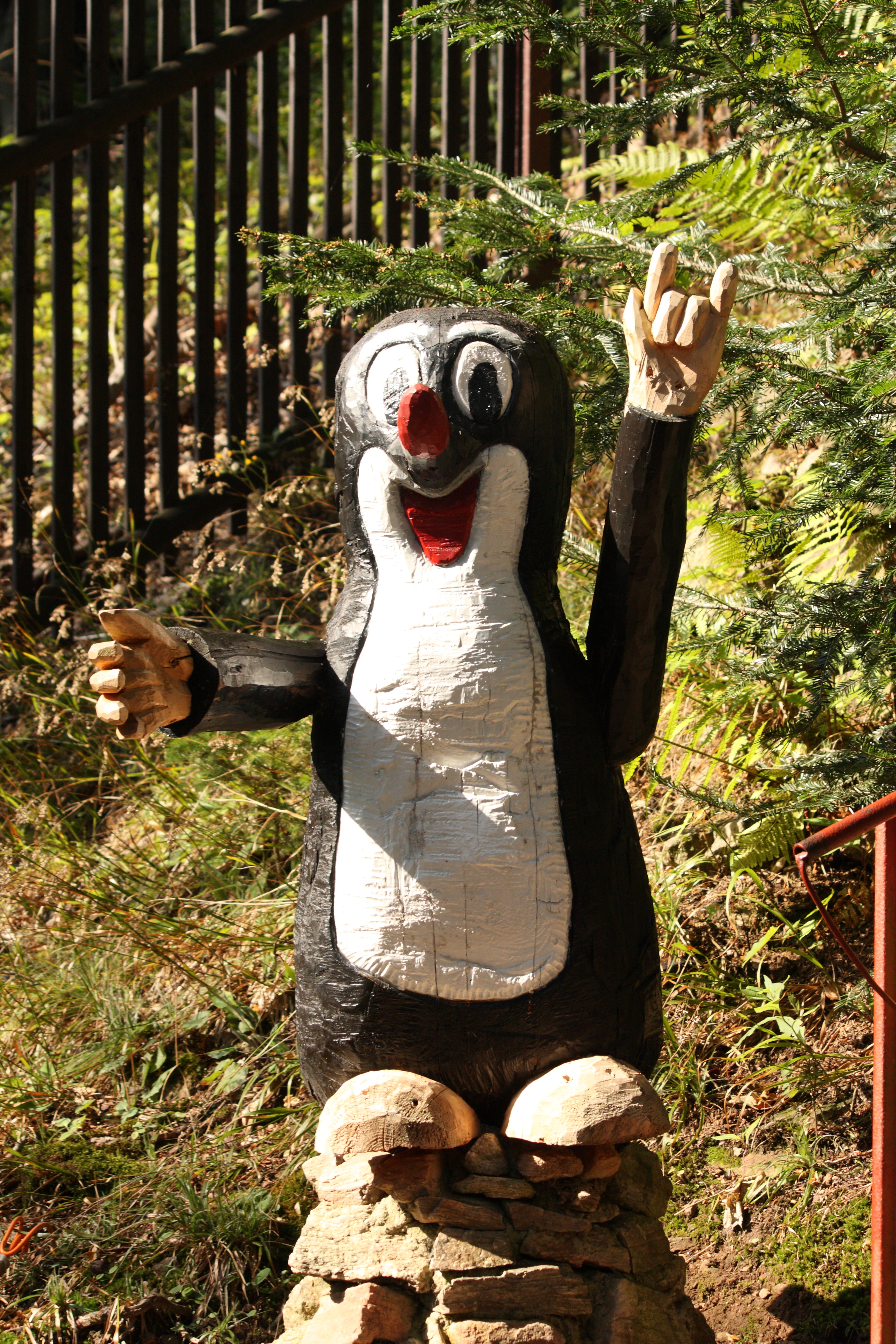 Krecik w Ogrodzie Bajek w Międzygórzu